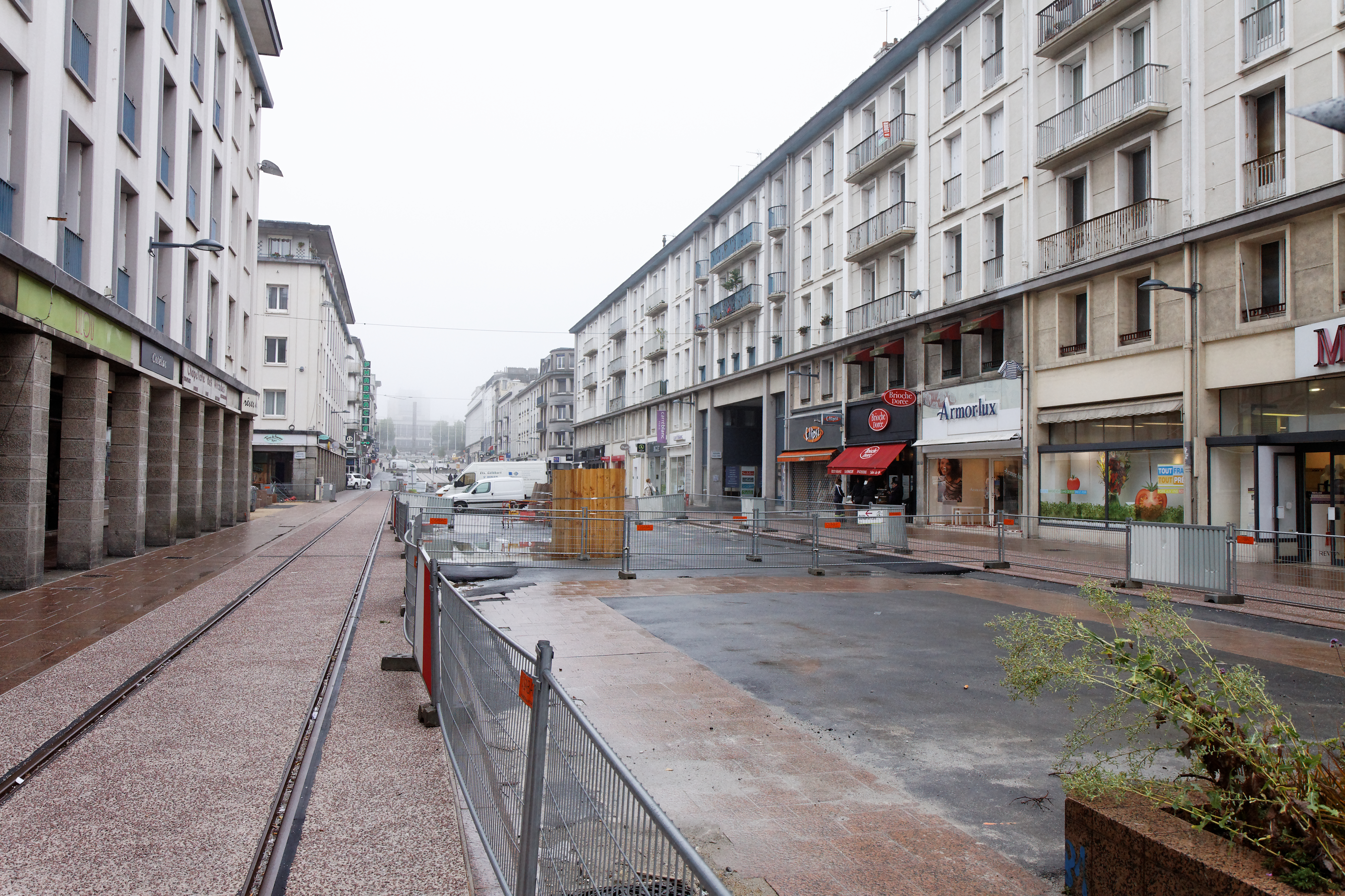 Travaux d'aménagement dans la rue de Siam pour l'arrivée du Tramway dans la ville en 2012.